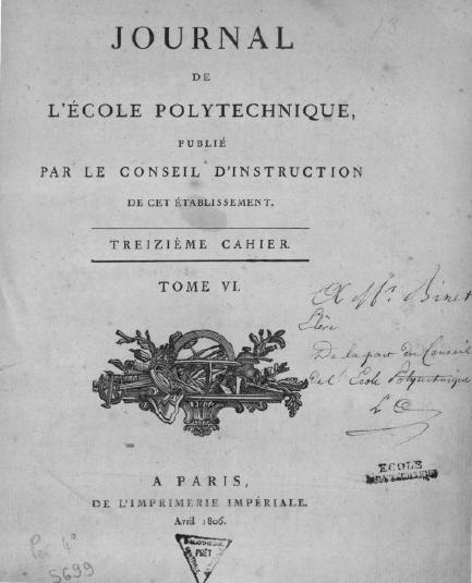 Journal de l'Ecole polytechnique